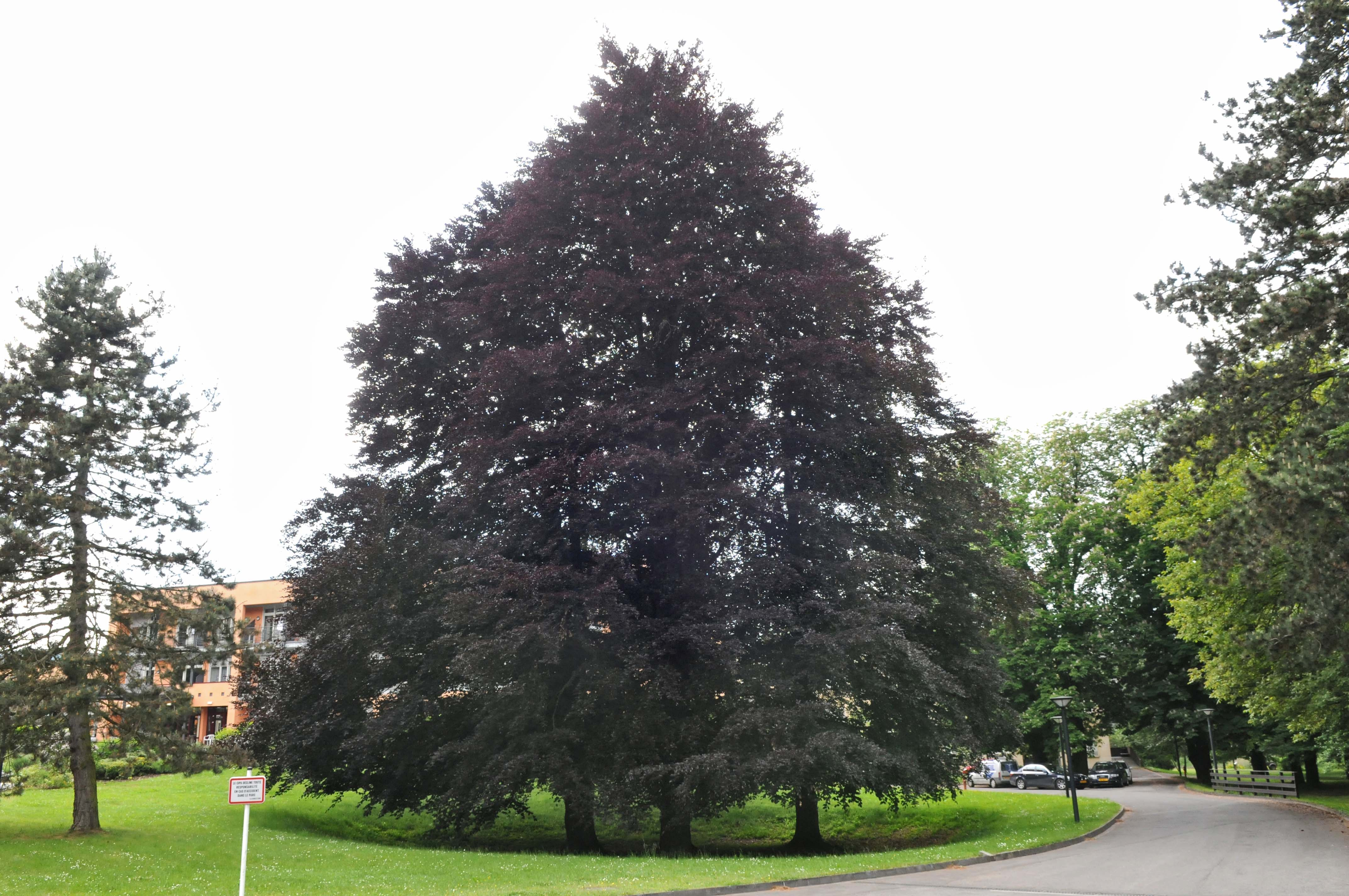 Bluttbuchen zu Bouferdeng.